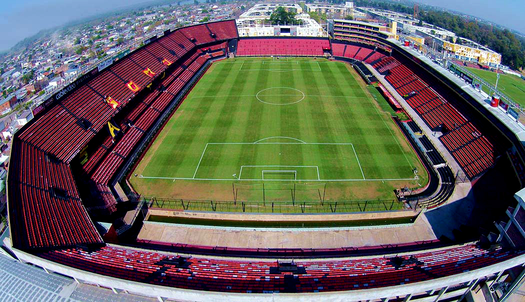 Foto tomada con un drone. Previo al Clásico Santafesino del 2015.